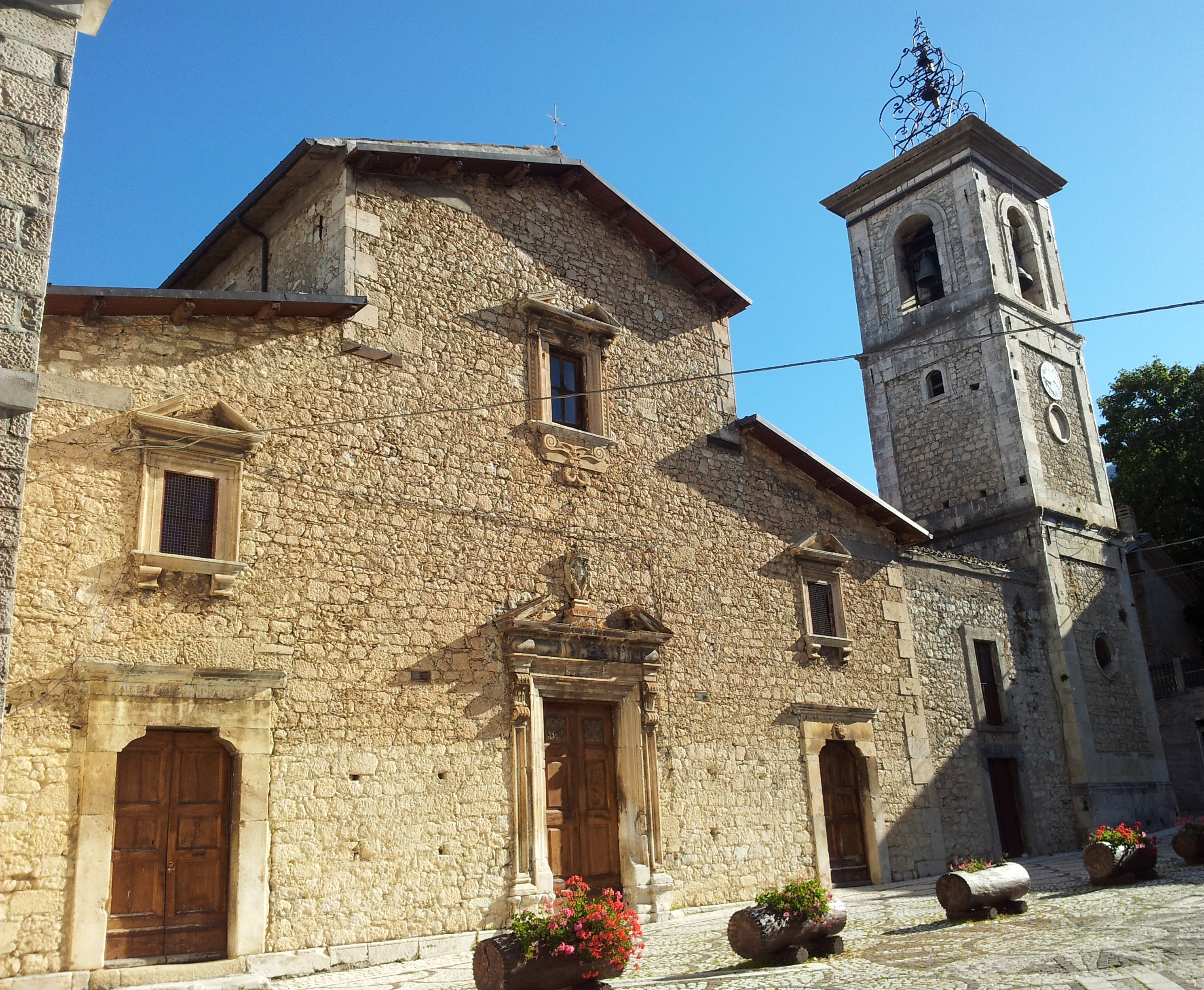 Chiesa di San Bartolomeo Apostolo (solo esterni) This is a photo of a monument which is part of cultural heritage of Italy.